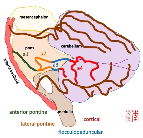 Segmentos de la AICA, antigua y nueva nomenclatura: • pontino anterior (a1) - verde • pontino lateral (s2) - naranja • flóculopeduncular (s3) - azul • cortical (s4) - rojo